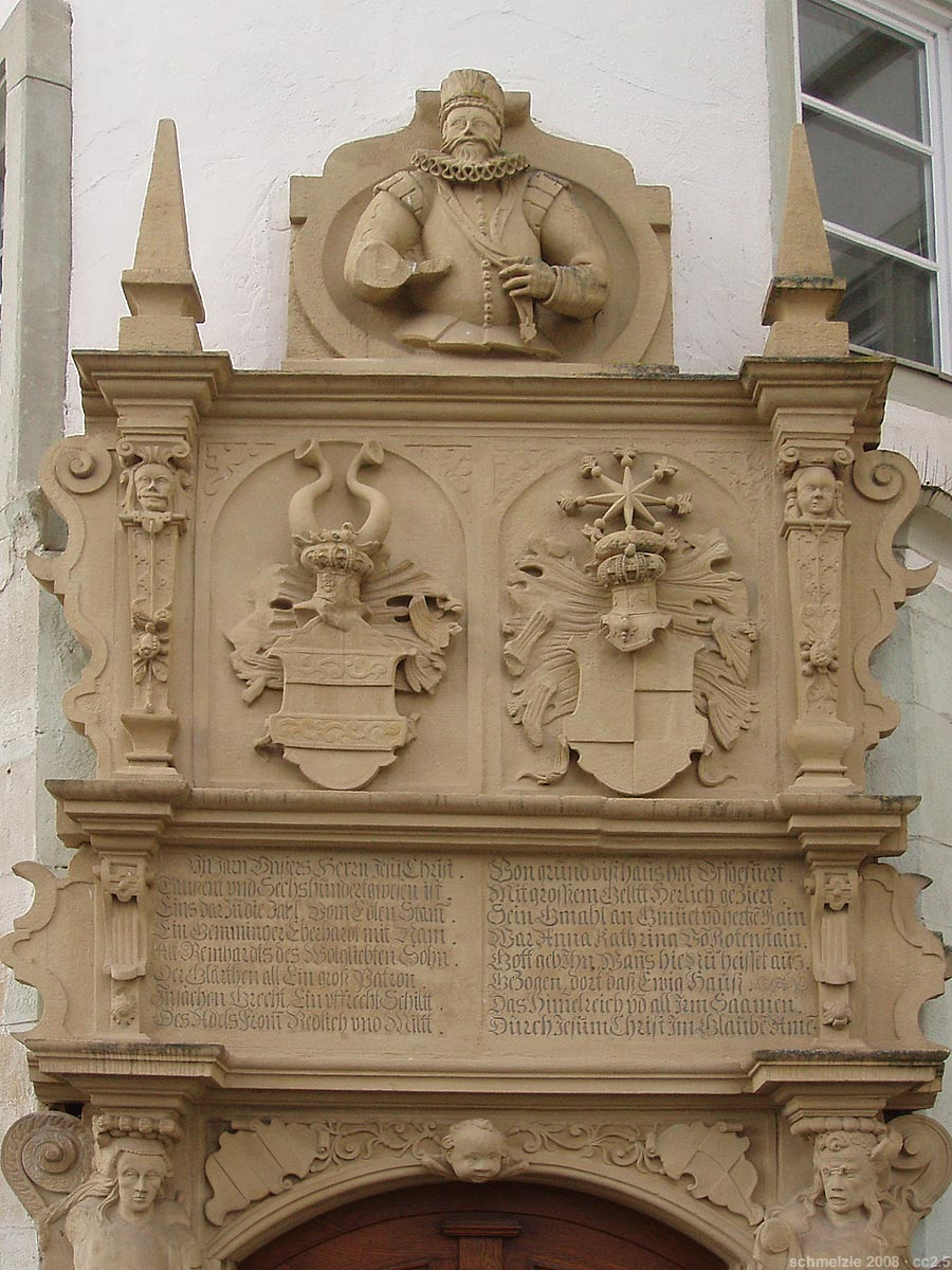 Detail des Portals des Wasserschlosses in Bad Rappenau. Das Brustbild zeigt den Erbauer des Bauwerks von 1601, Eberhard von Gemmingen. Darunter das Gemmingen-Rotensteinsche Allianzwappen.